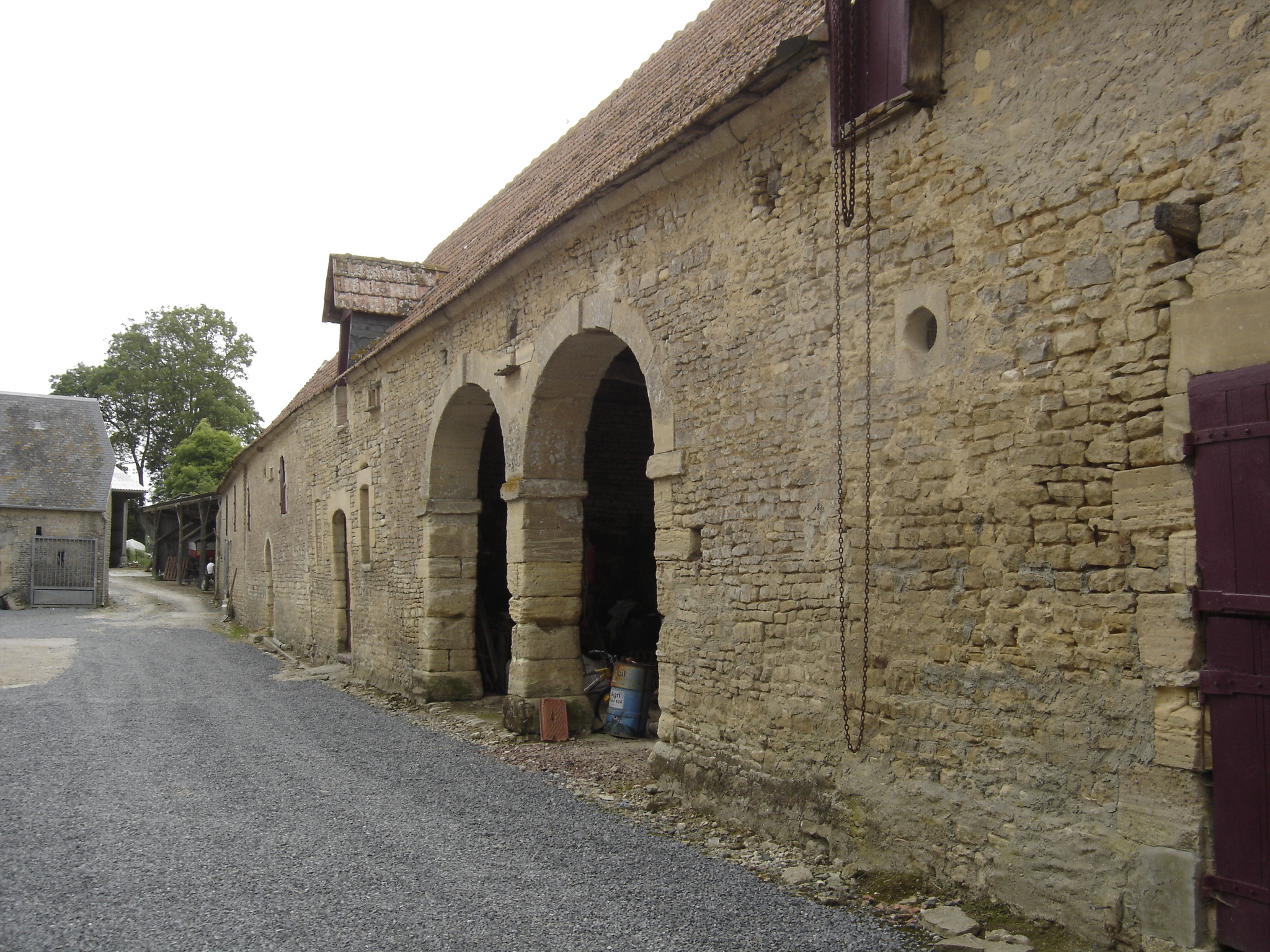 grange ancienne encore utilisée comme bâtiment de ferme